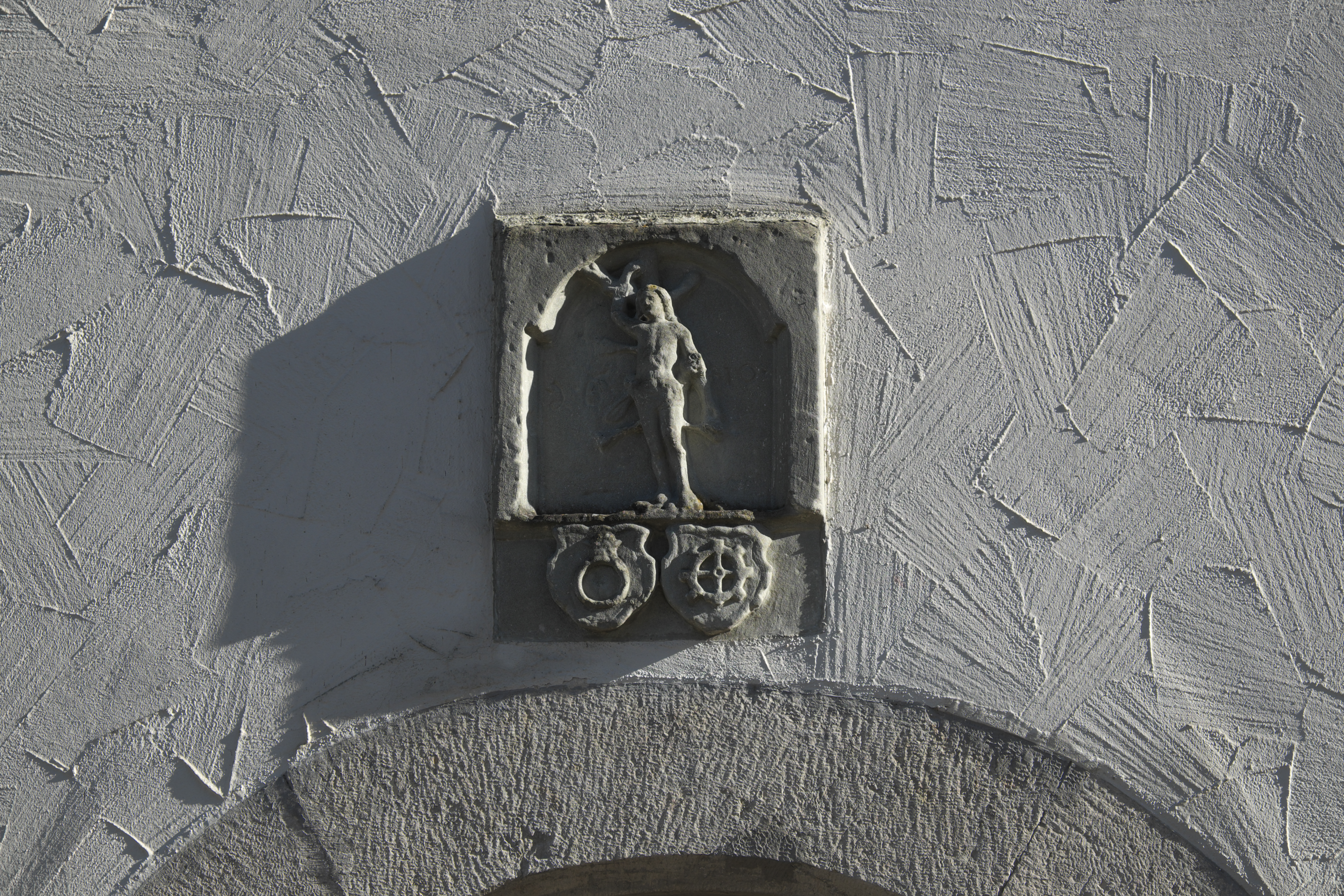 Sebastianskapelle in Mühlheim an der Donau im Landkreis Tuttlingen (Baden-Württemberg/Deutschland), Relief des heiligen Sebastian, mit der Jahreszahl 1610, unten die Wappen der Familie Enzberg und der Stadt Mühlheim